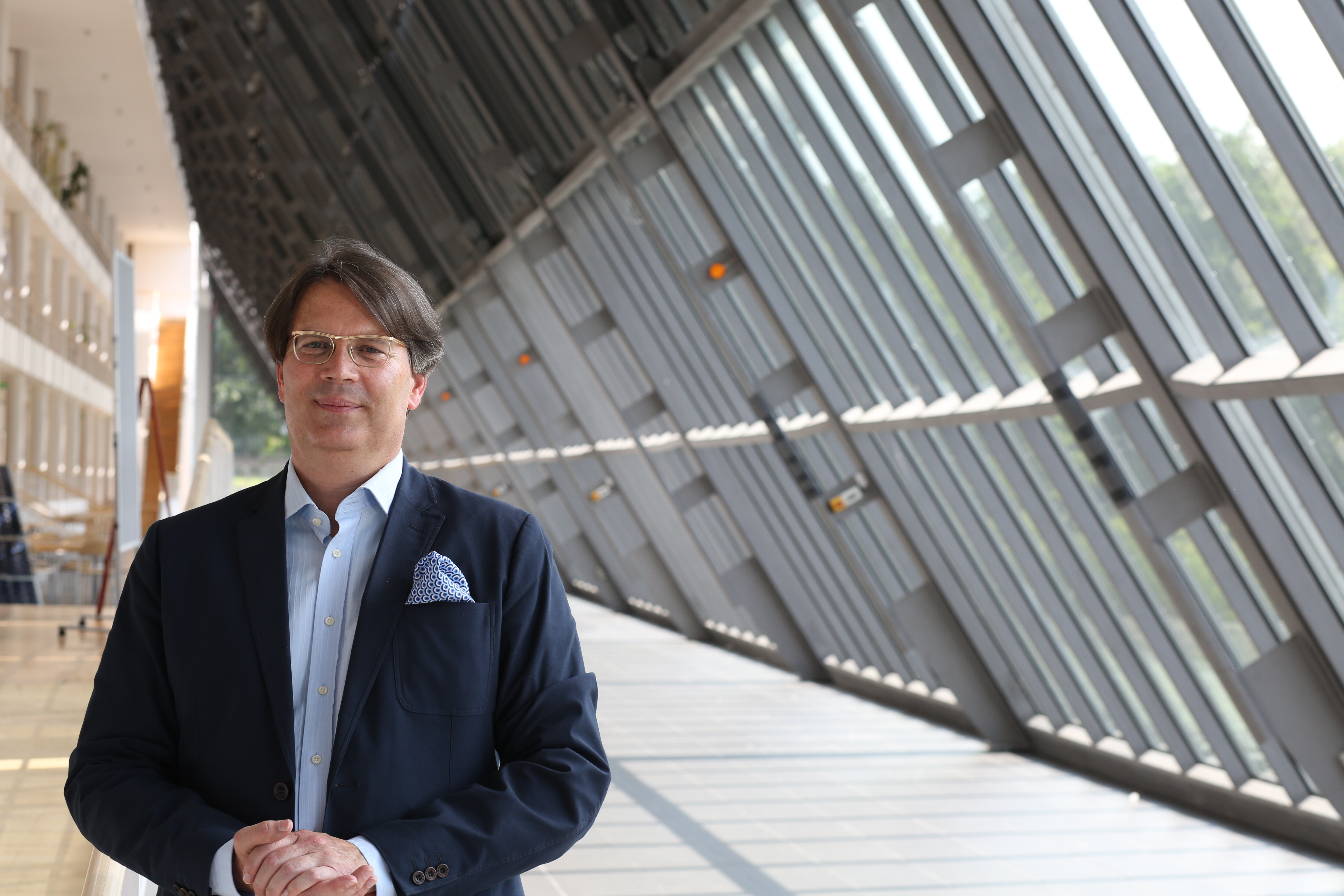 Geschäftsführer und wissenschaftlicher Leiter des Instituts für Workflow-Management im Gesundheitswesen (IWiG), An-Institut der praxisHochschule Köln